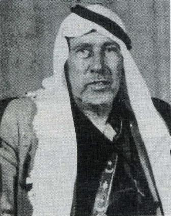 השייח' סלמאן אל הוזייל באחרית ימיו